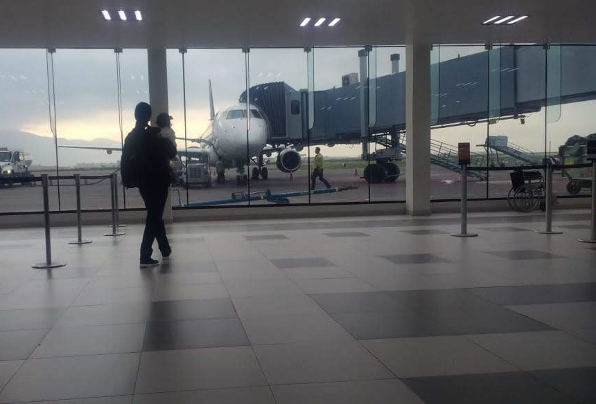 Imagen de la terminal 1